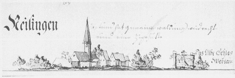 Reilingen und Schloss Wersau